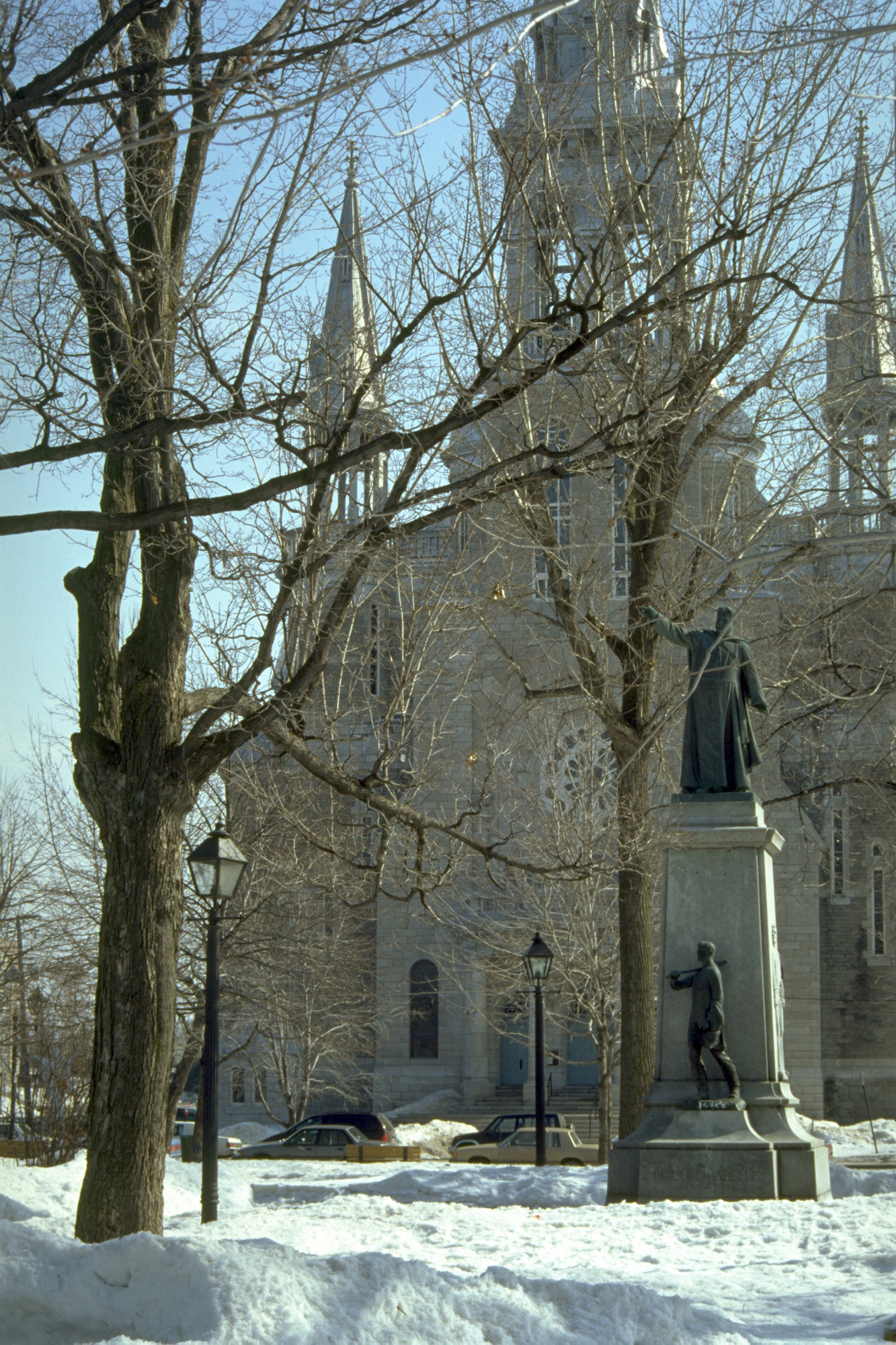 Cathédrale et statue du curé Antoine Labelle, à Saint-Jérôme, Québec